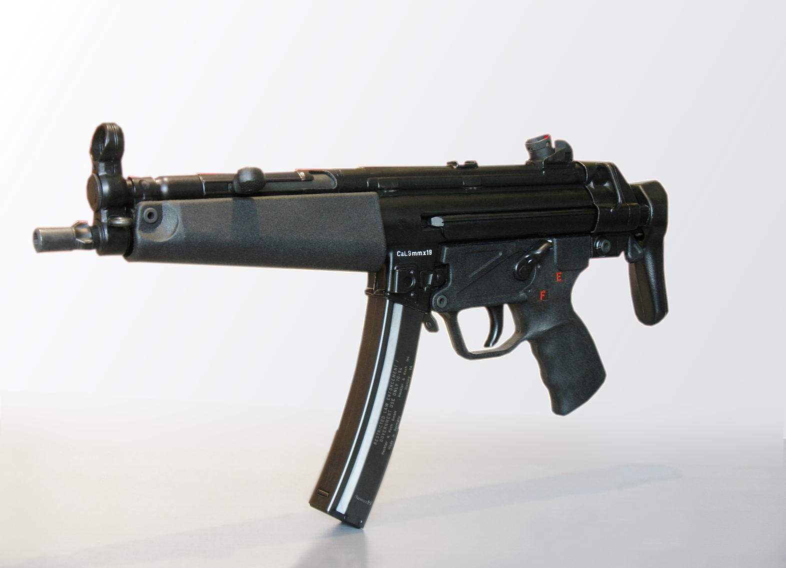 Heckler & Koch MP5